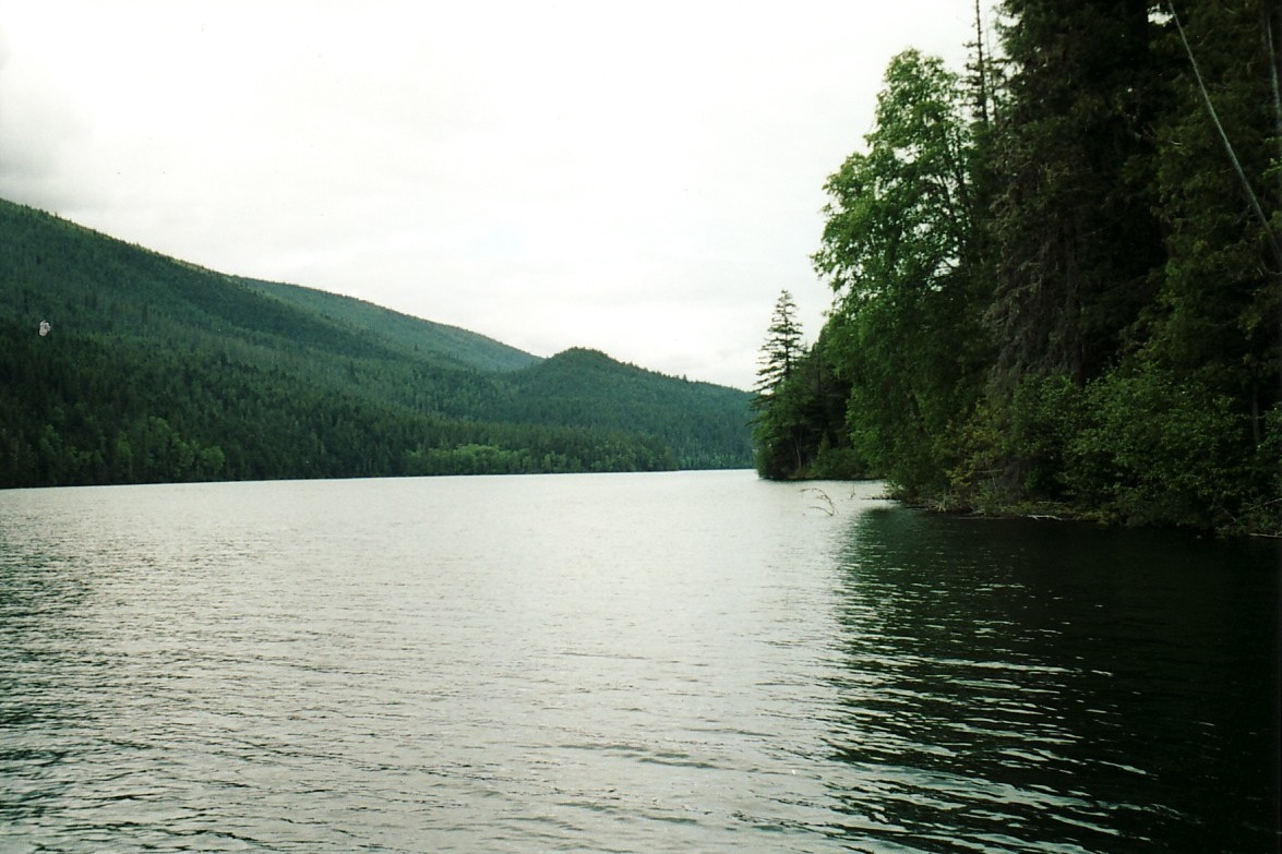 Clearwater Lake (Wells Gray Provincial Park)